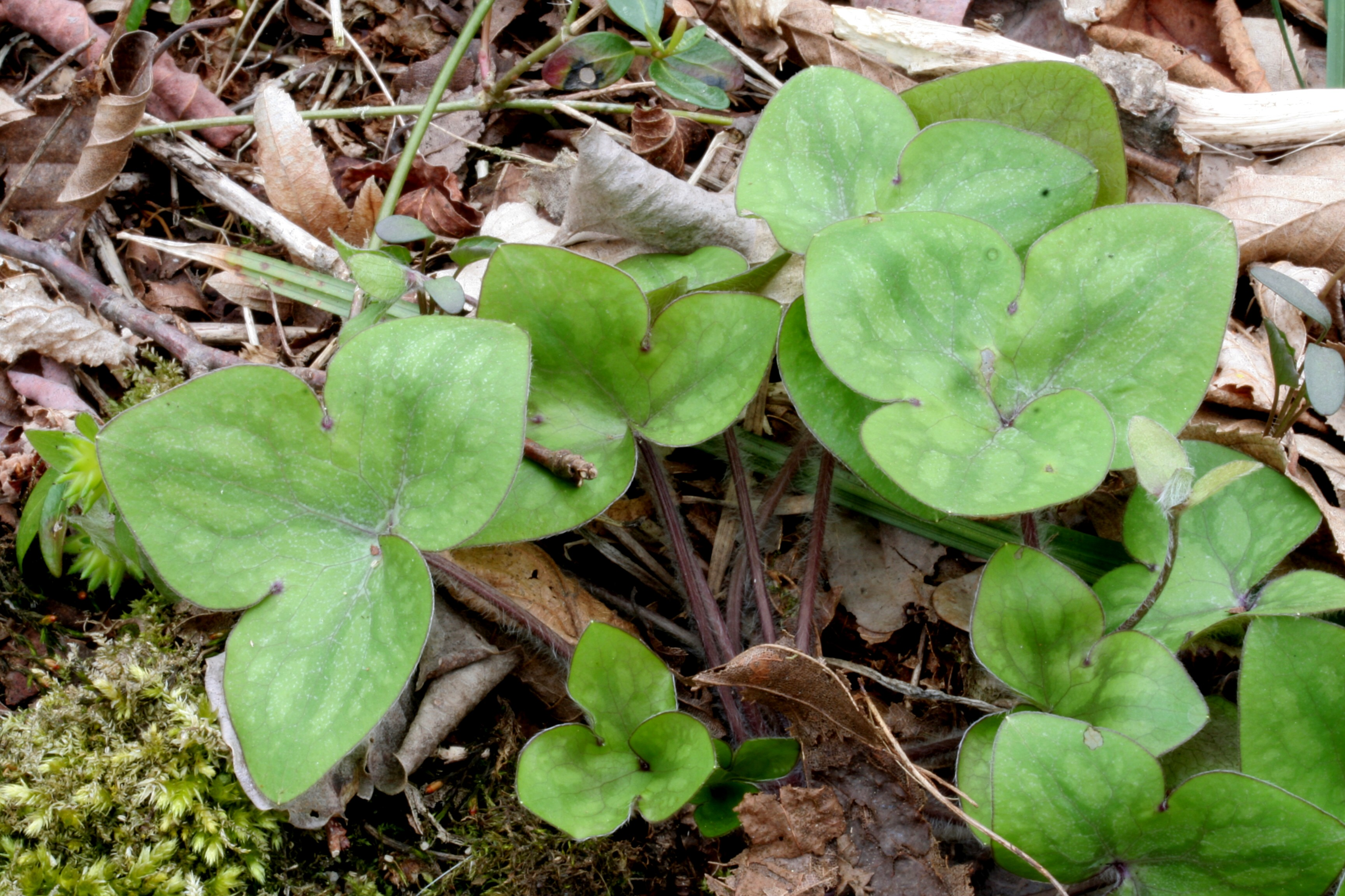 Erba trinità - Località : Pasa, Sedico (BL), 356 m s.l.m.